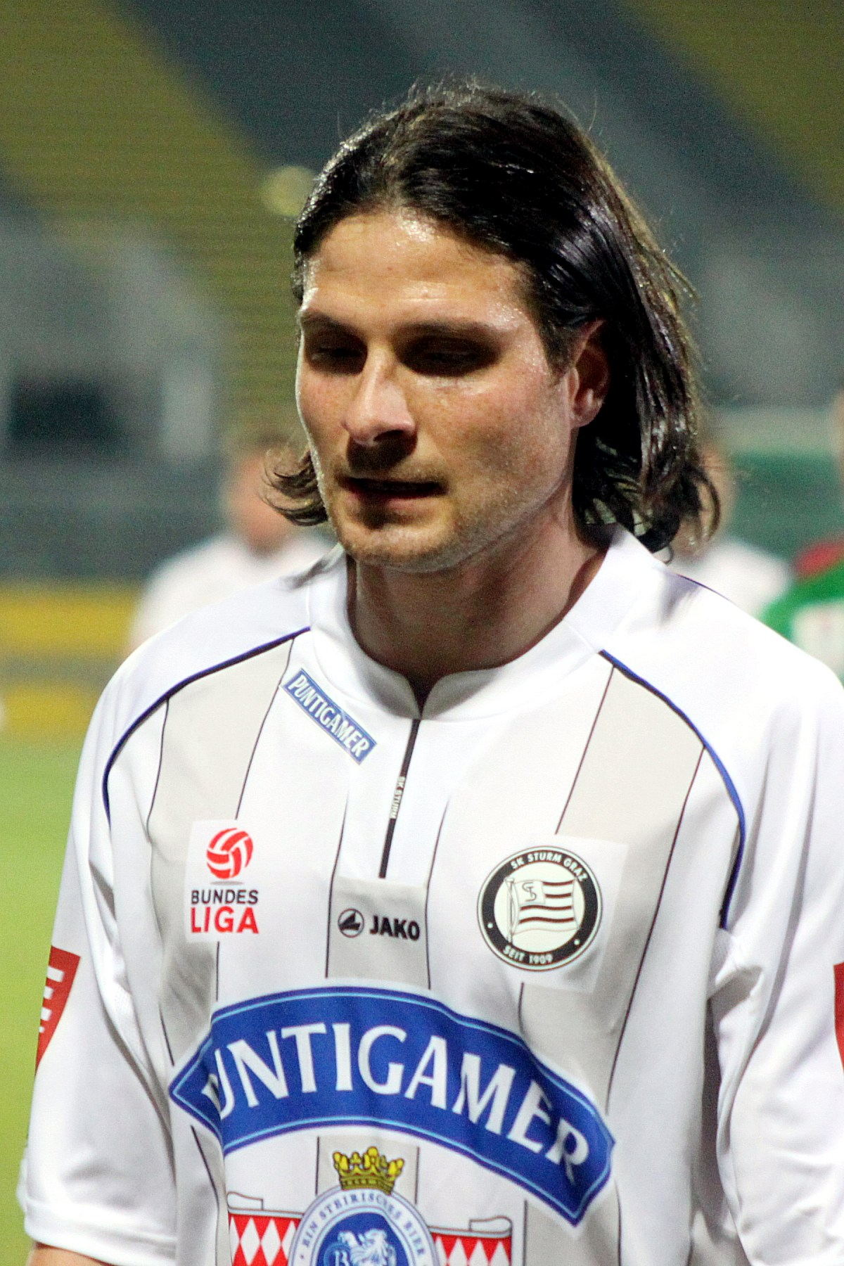 Meisterschaftsspiel SV Mattersburg (grüne Trikots) gegen SK Sturm Graz (weiße Trikots). – Das Bild zeigt: Imre Szabics (SK Sturm Graz). Object location47° 44′ 21.67″ N, 16° 24′ 23.15″ E